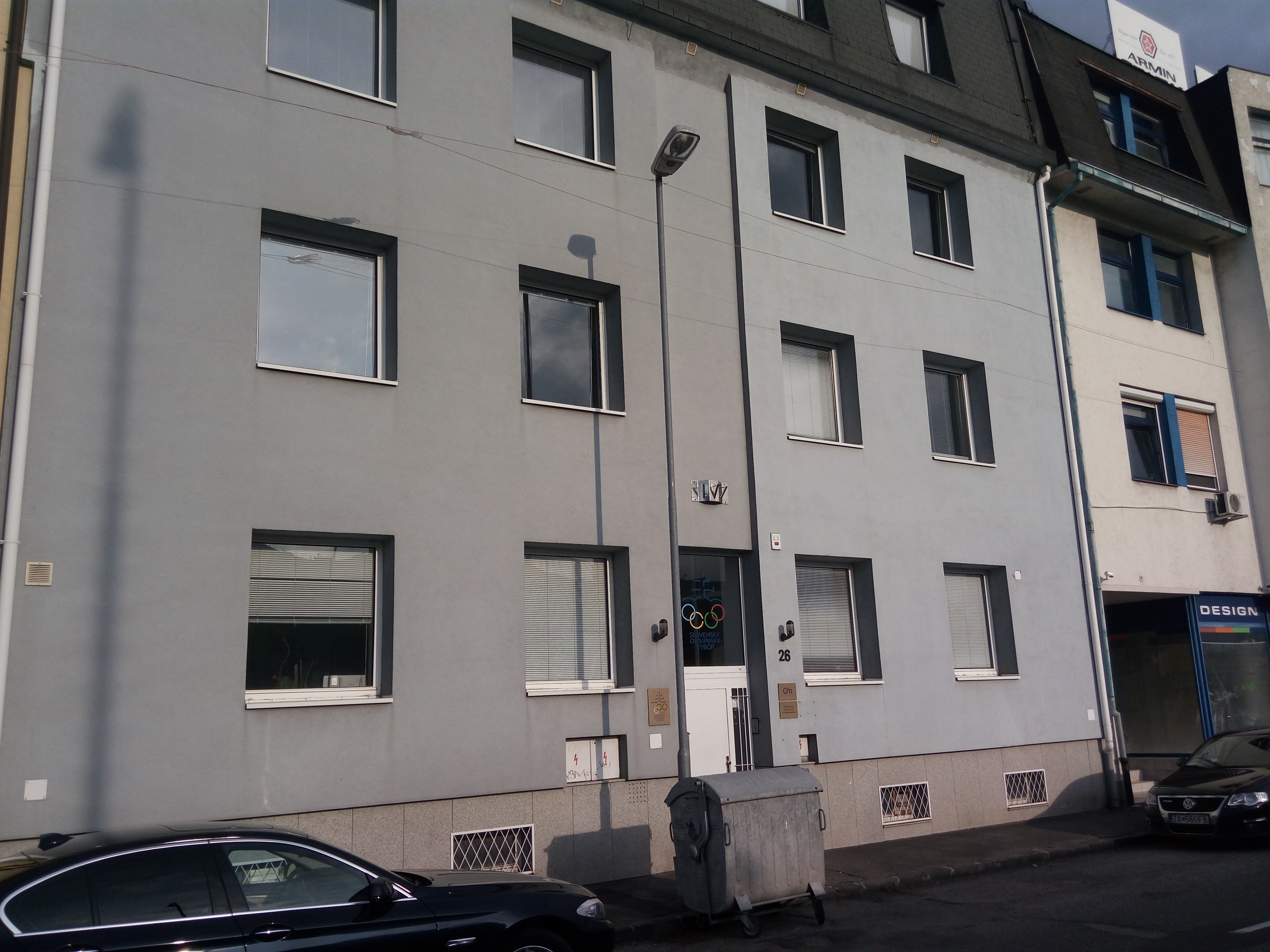 Kukučínova 26, Nové Mesto, Bratislava